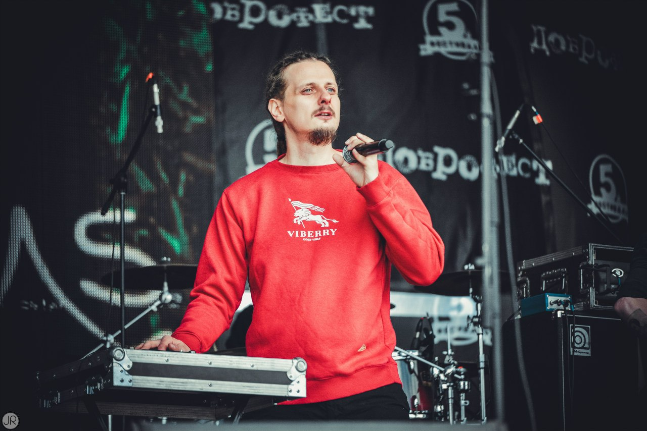 RasKar на Доброфесте